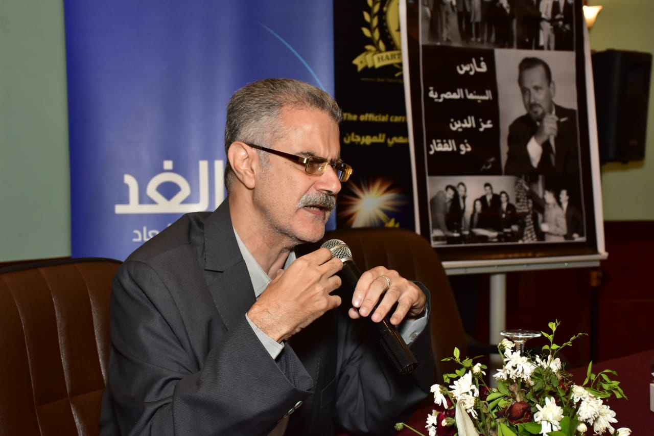 الكاتب الصحفي أشرف غريب- رئيس تحرير مجلة الكواكب